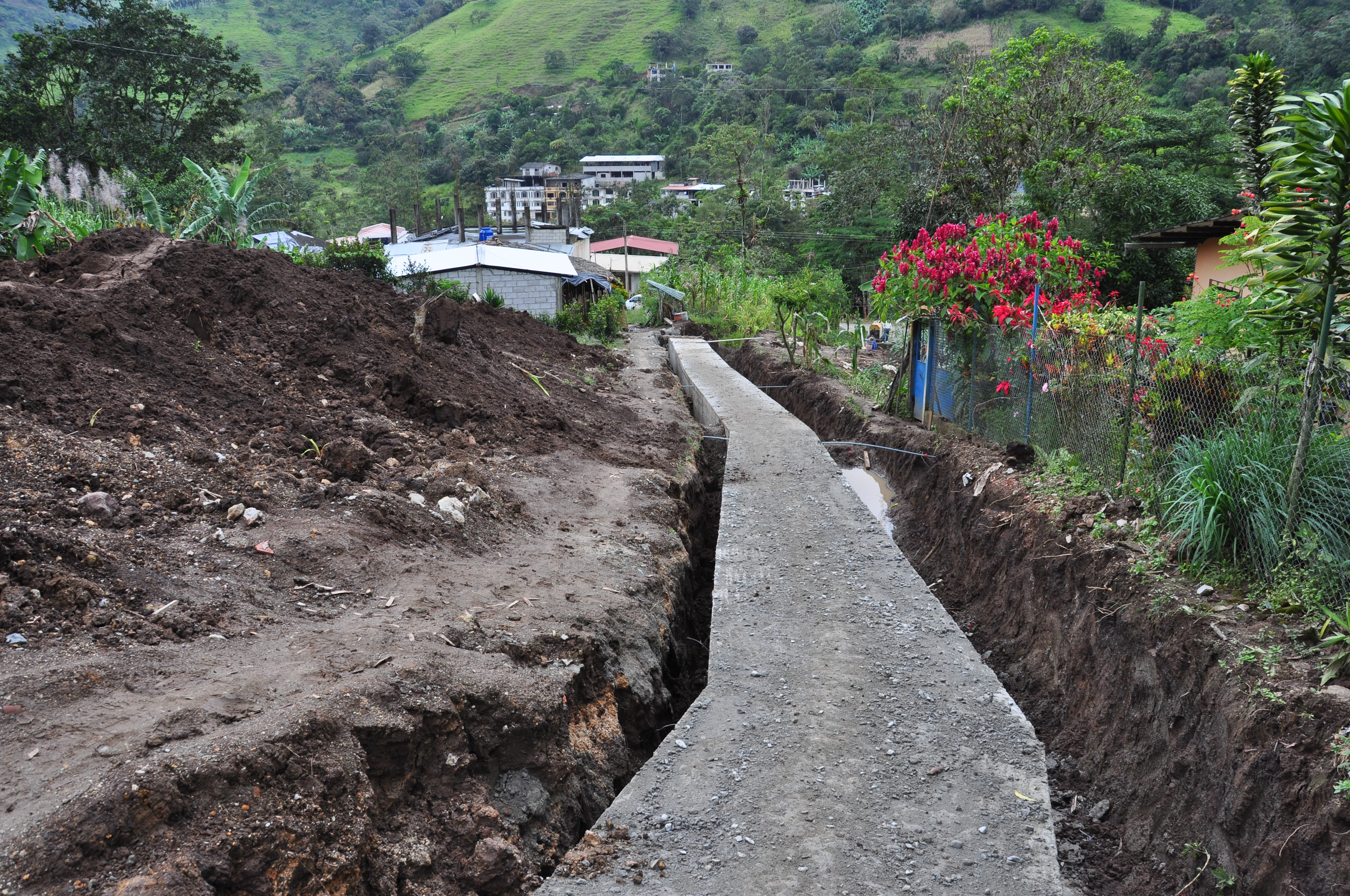 113 Colector quebrada la florida 1